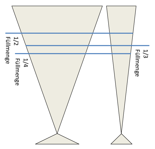 Frappé-Effekt bei kubischen Gläsern unterschiedlichen Radiusses